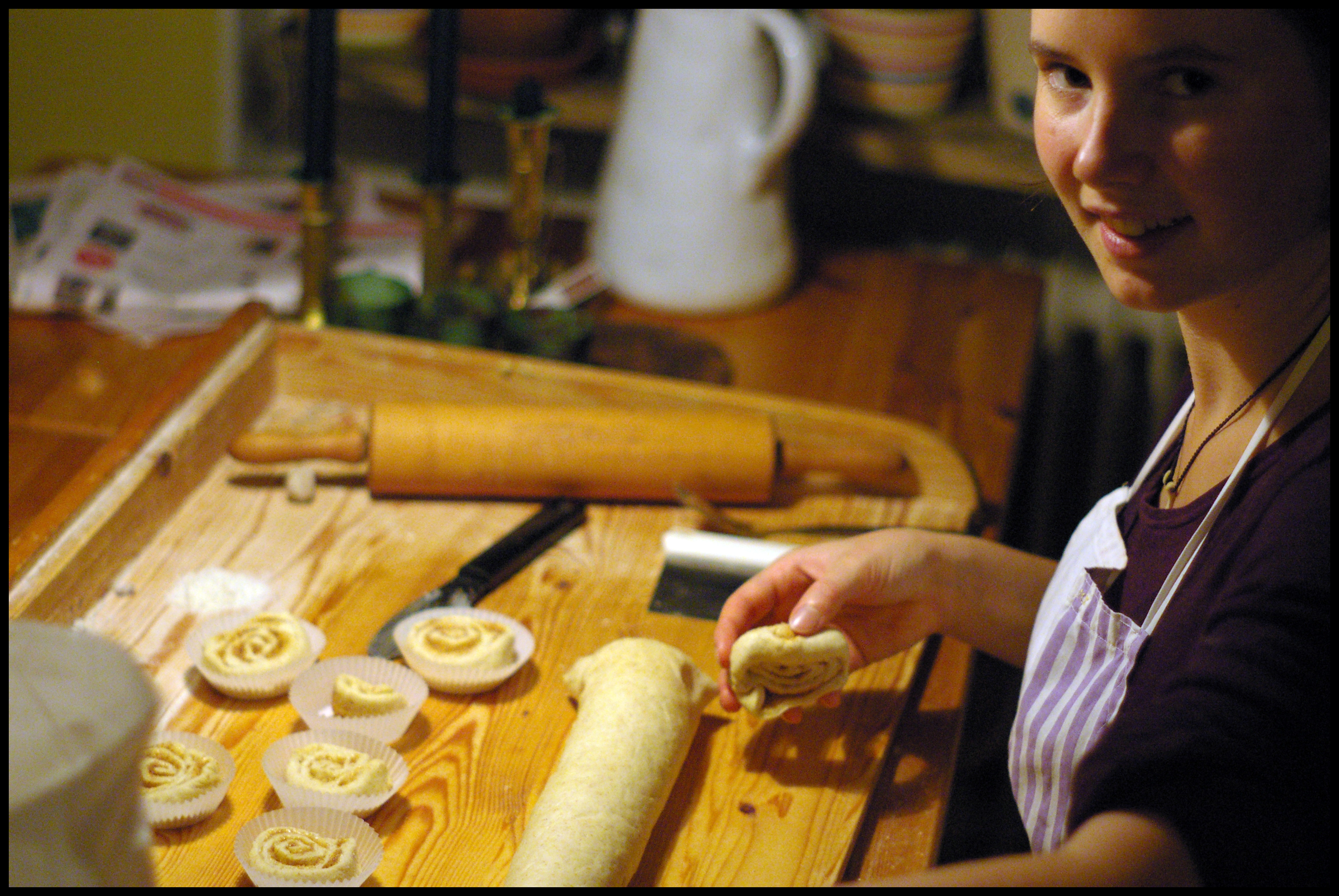 Me and My baked some cinnamon rolls last sunday. Mi kaj My bakis kelkajn cinambulkojn pasintdimanĉe. Pentax K100D Super